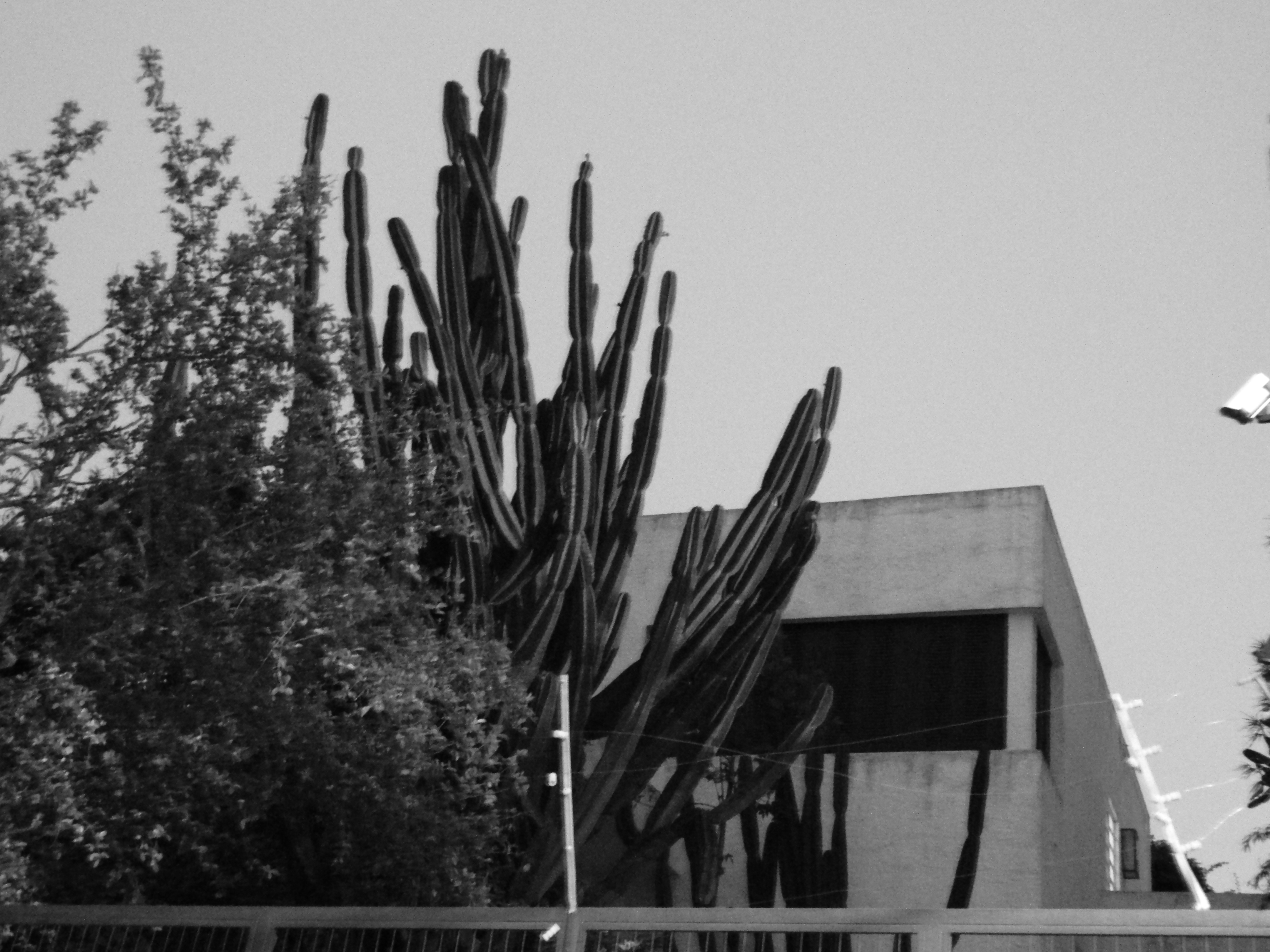 Casa de Warchavchik - detalhe da fachada principal